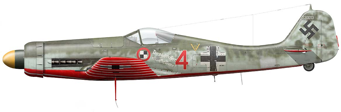 Focke-Wulf Fw 190D vom Jagdverband 44, Platzsicherungstaffel, München-Riem, April 1945.